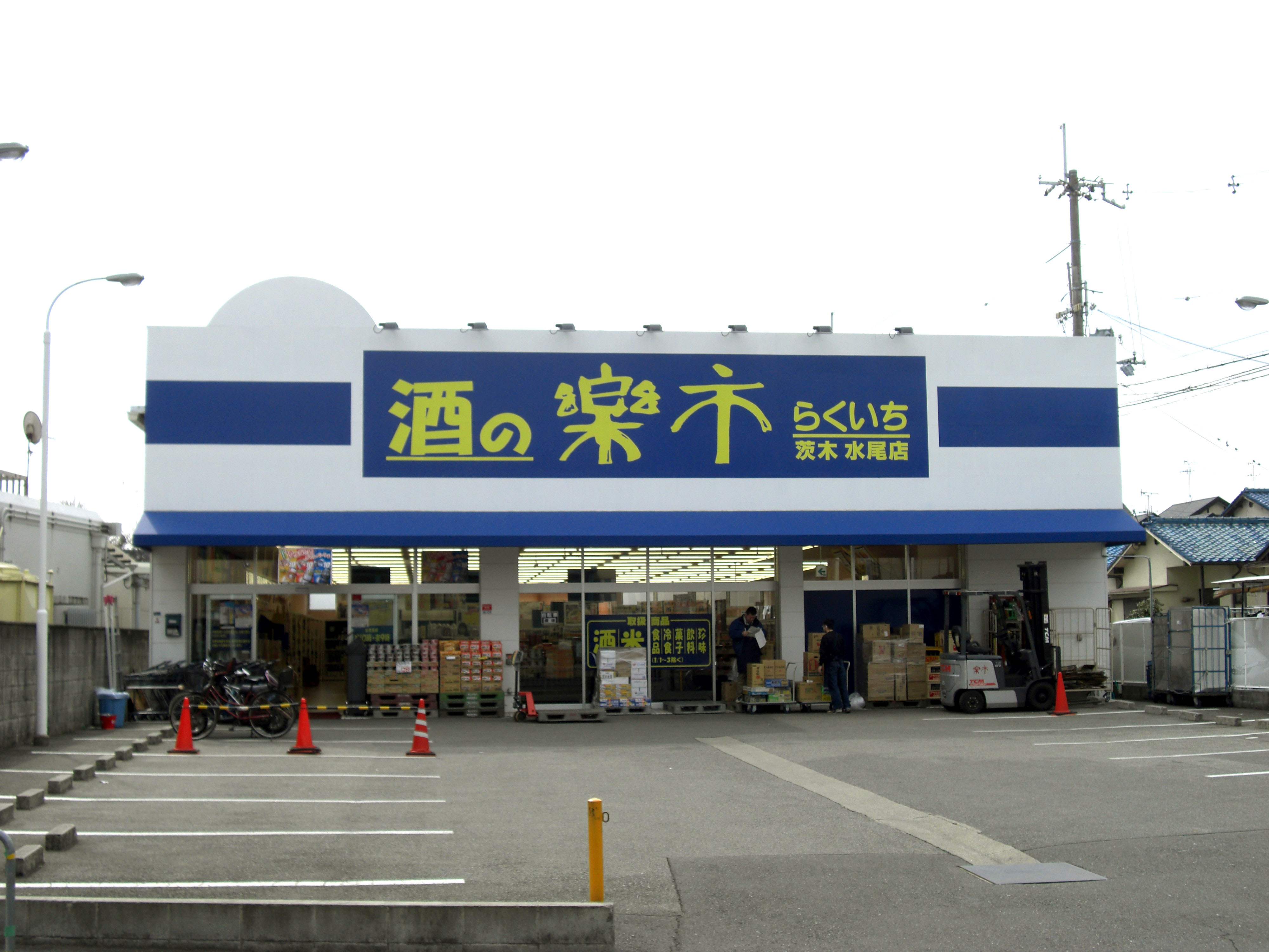 Sake no Rakuichi,Mizuo Ibaraki-shi Osaka Japan.